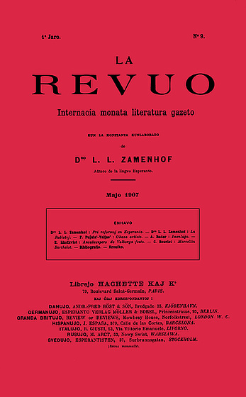 La Revuo Majo1907